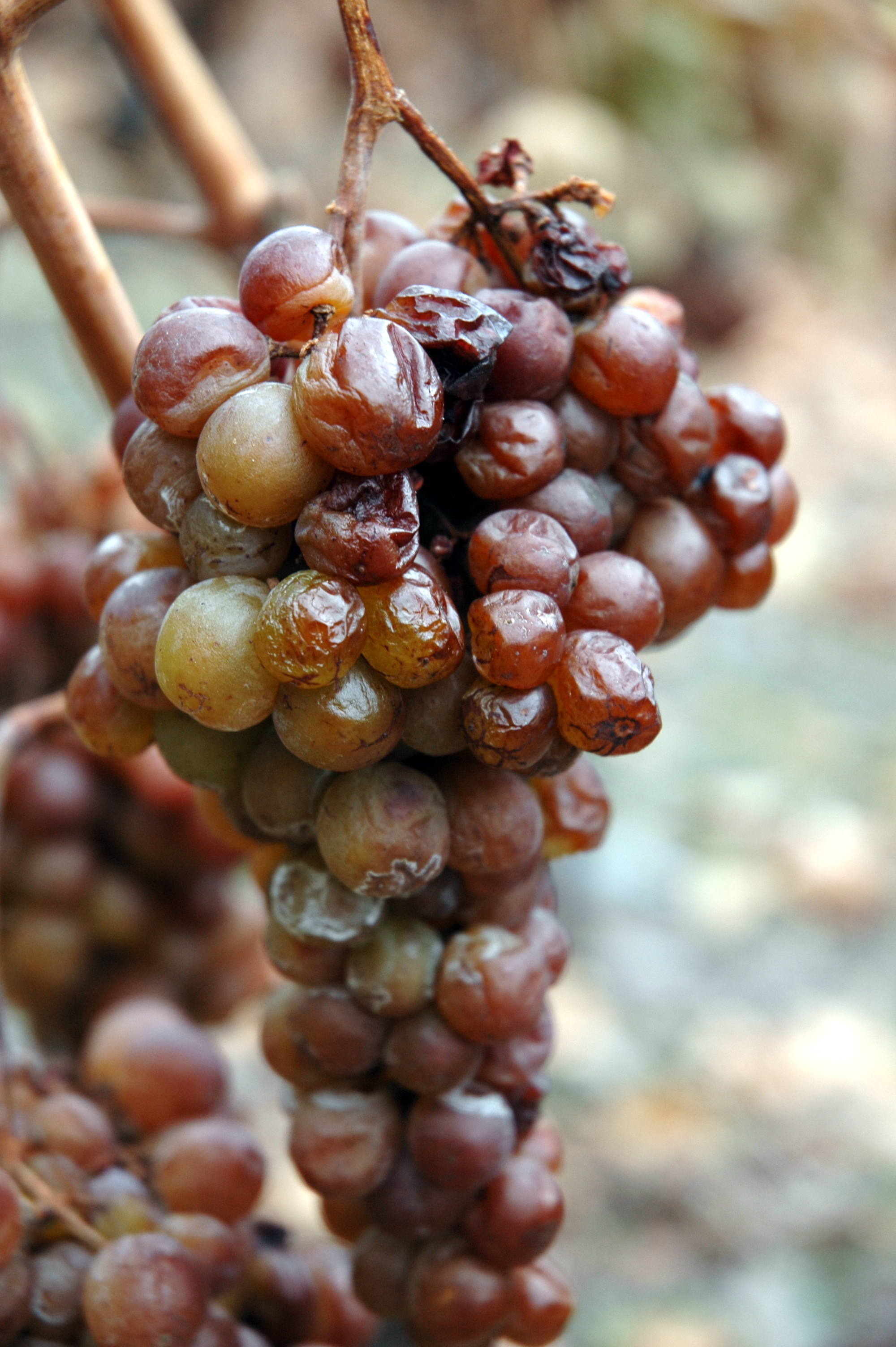 Passerillage sur souche de la Marsanne blanc en Valais